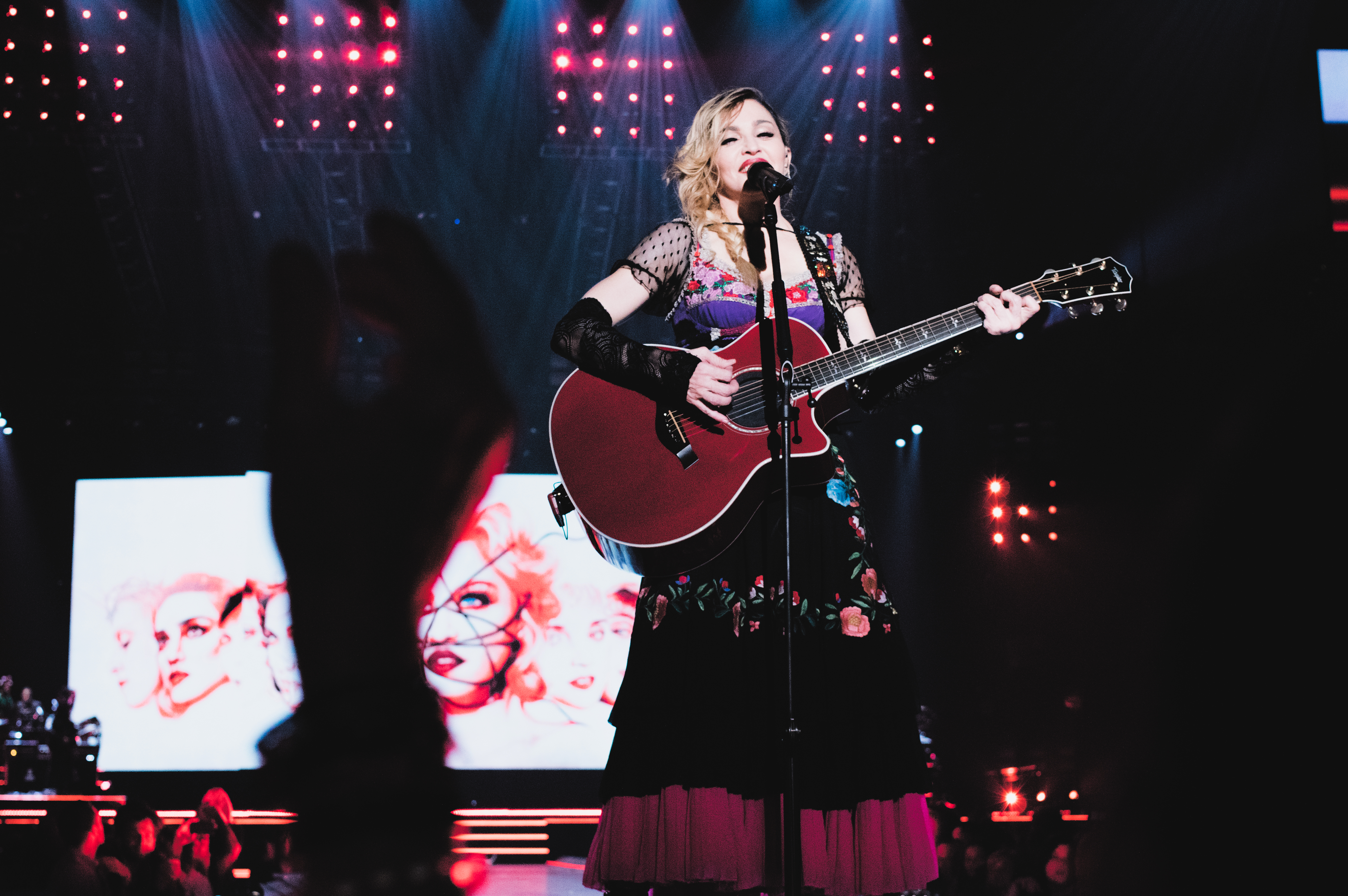 Philadelphia, PA